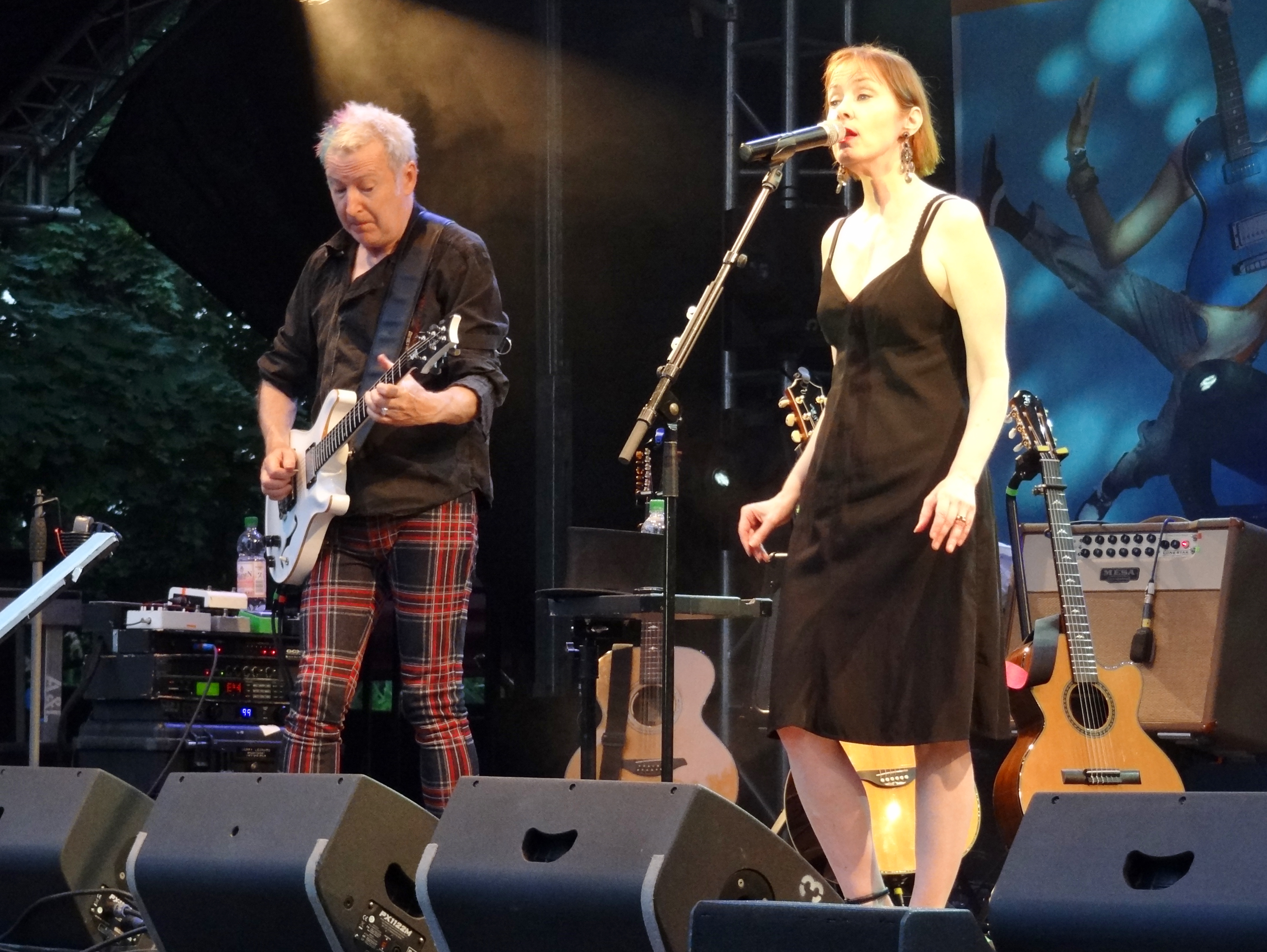 Suzanne Vega mit Gerry Leonard beim 13. Inselleuchten-Festival in Marienwerder, Land Brandenburg, Deutschland